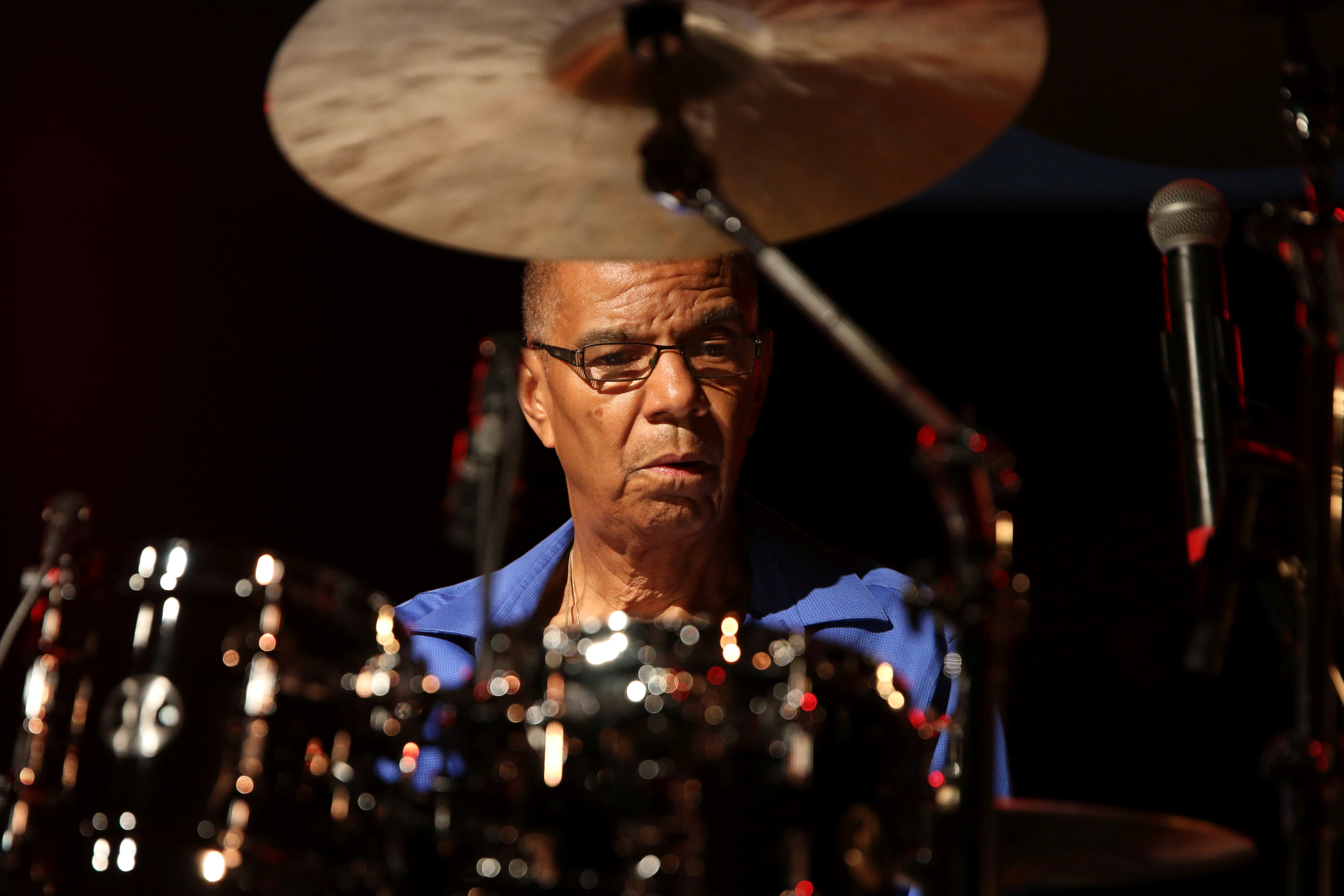 46. Deutsches Jazzfestival Frankfurt 2015: Jack DeJohnette